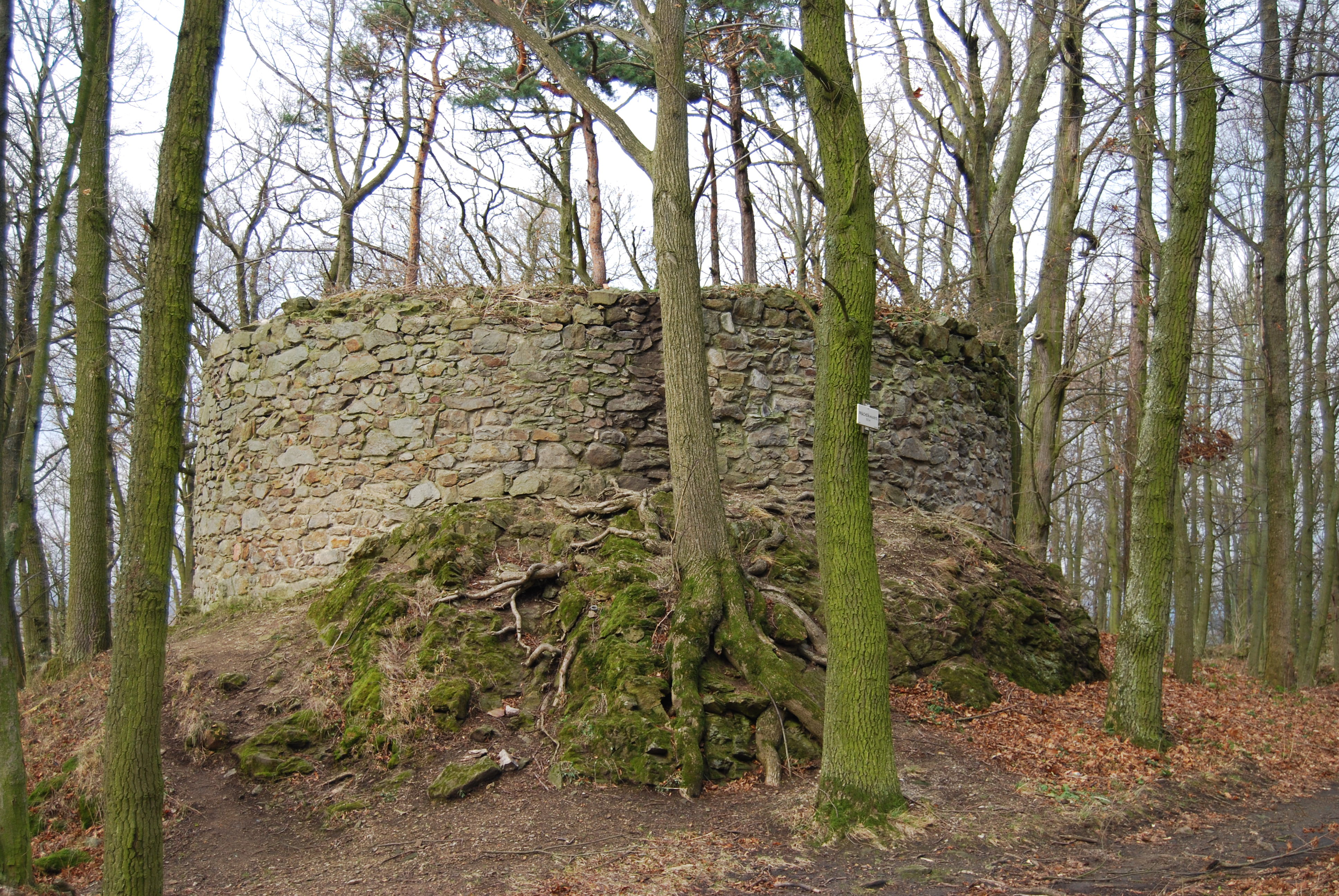 Okrouhlá útočištní věž. Prácheň - zřícenina gotického hradu na skále nad Otavou u Horažďovic. Okres Klatovy. Česká republika. - OpenStreetMap (Info)